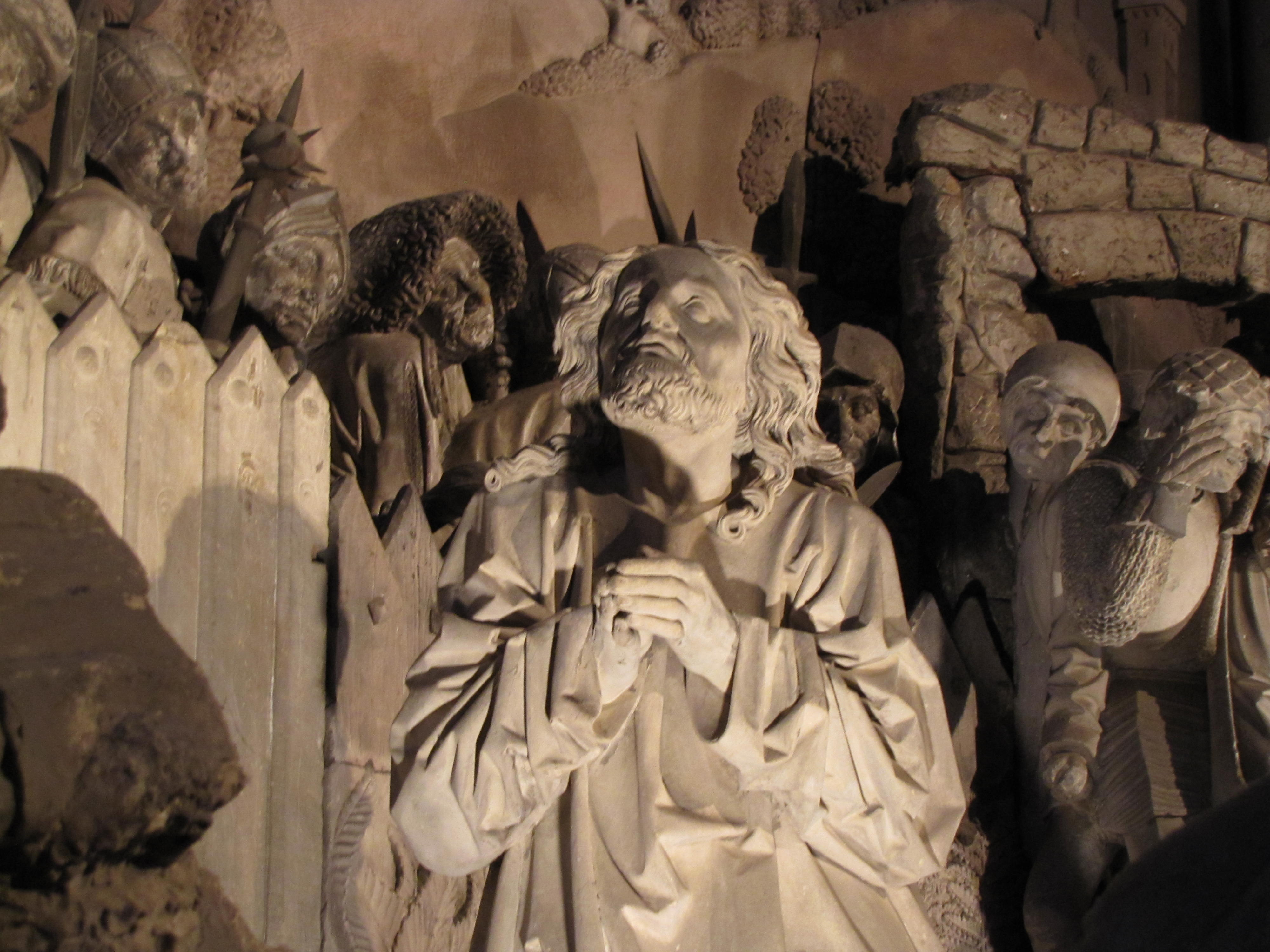 Alsace, Bas-Rhin, Cathédrale Notre-Dame de Strasbourg (PA00085015). Croisillon nord, Mont des Oliviers (XVe): Jésus priant.